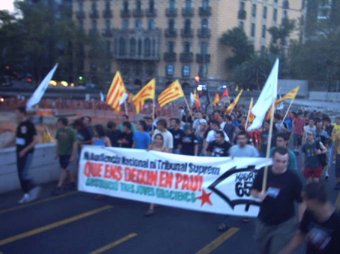 Pancarta amb el lema "Ni Audiencia Nacional ni Tribunal Suprem. Que ens deixin en pau. Absolució tres joves graciencs". La manifestació fou convocada el dijous 20 d'agost de 2004 a la Plaça Revolució de Gràcia, a les 19.00 h.